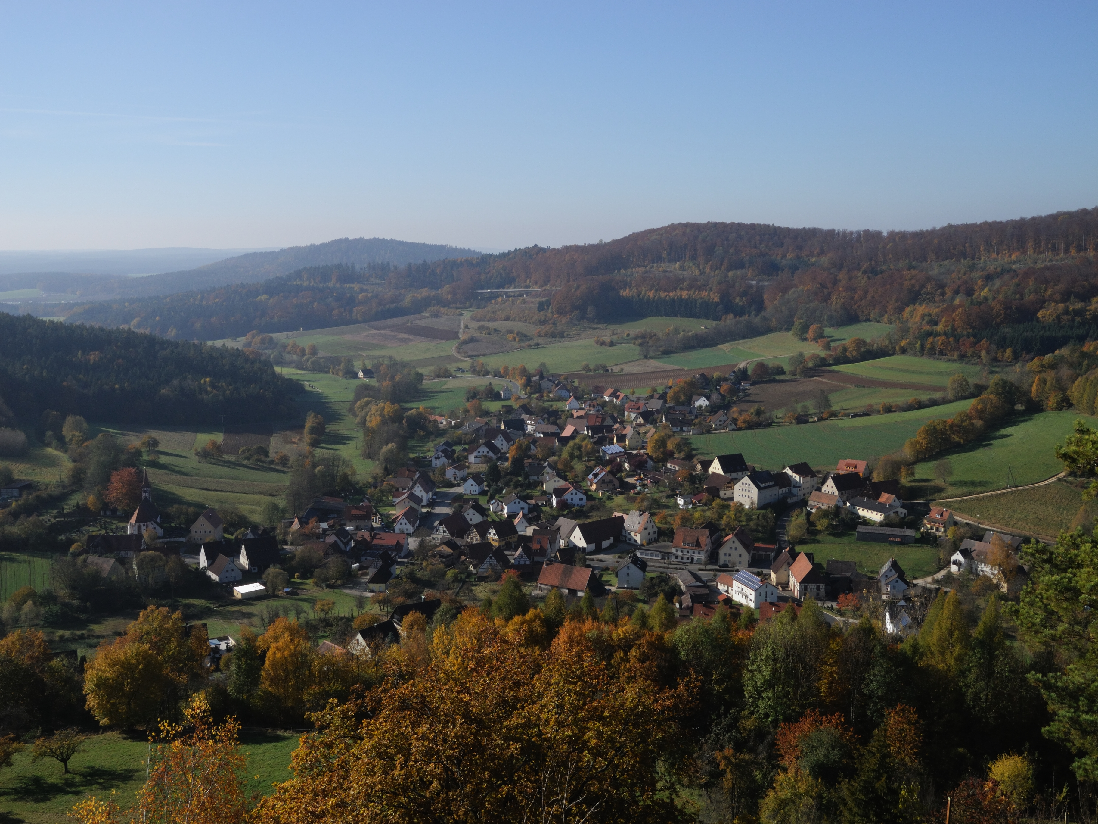 Ansicht von Osternohe aus östlicher Richtung